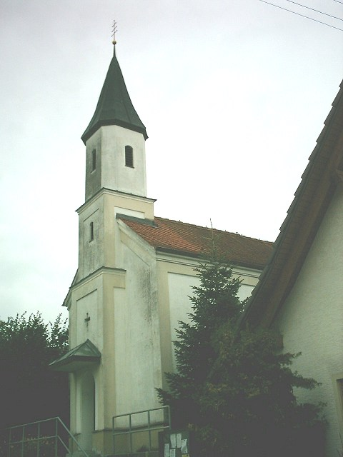 Kapelle in Frechholzhausen (Süd-West-Ansicht)